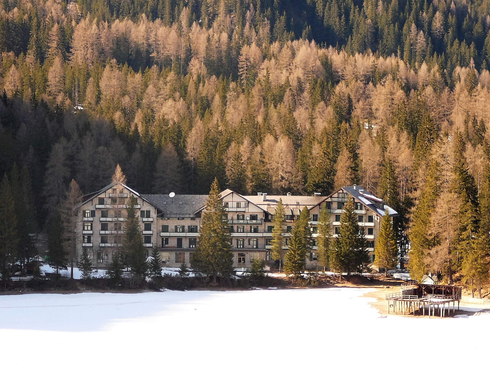 Lago di Braies, Alto Adige, Italia.